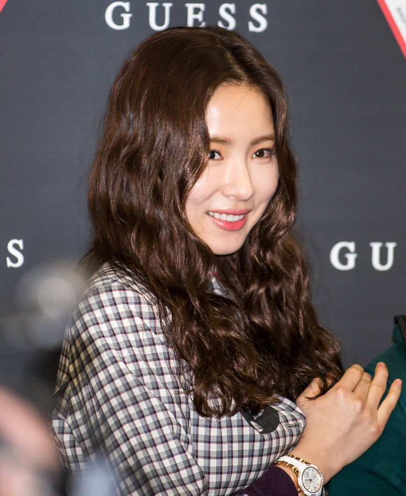 150307 게스워치.신세경.팬싸인회